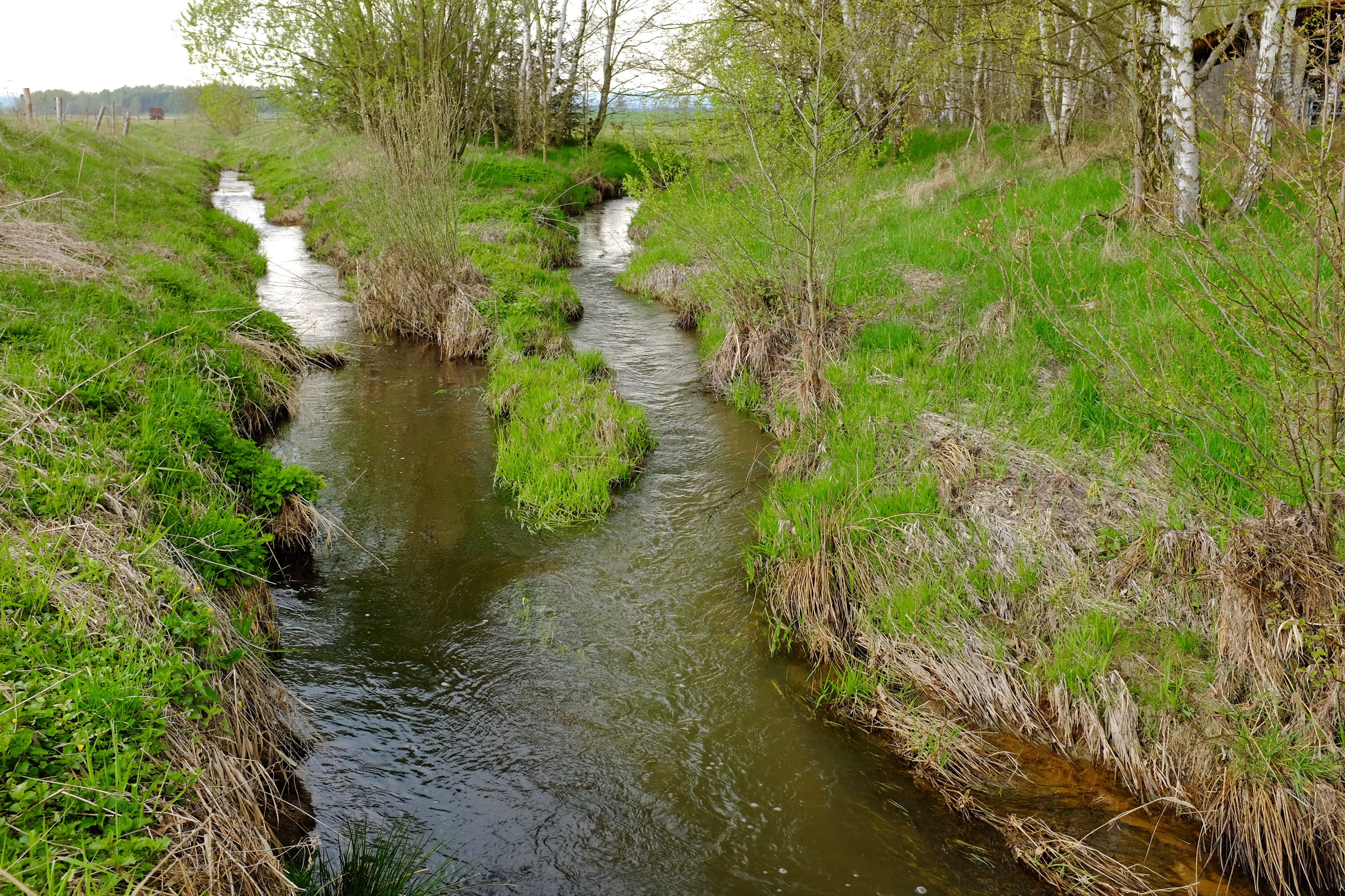 Soutok potoku Sázek a Stodolského potoka pod osadou Povodí, části obce Třebeň, okres Cheb